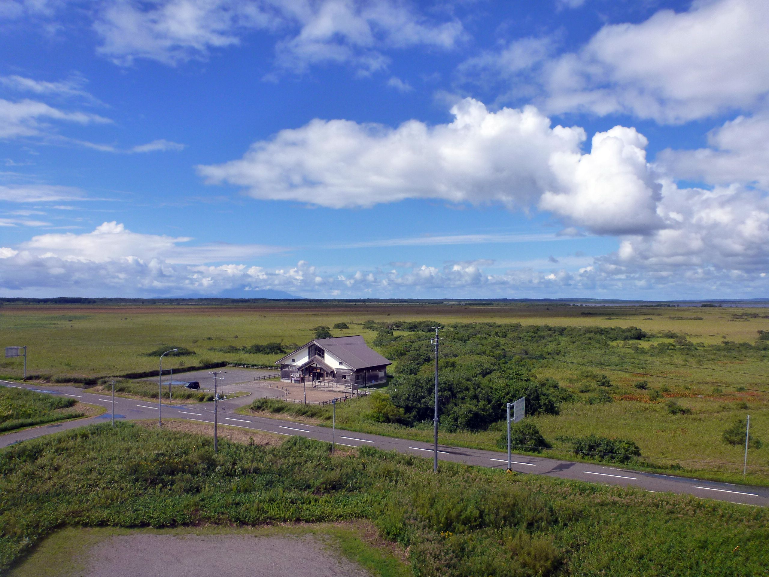 幌延ビジターセンターと周囲のサロベツ原野